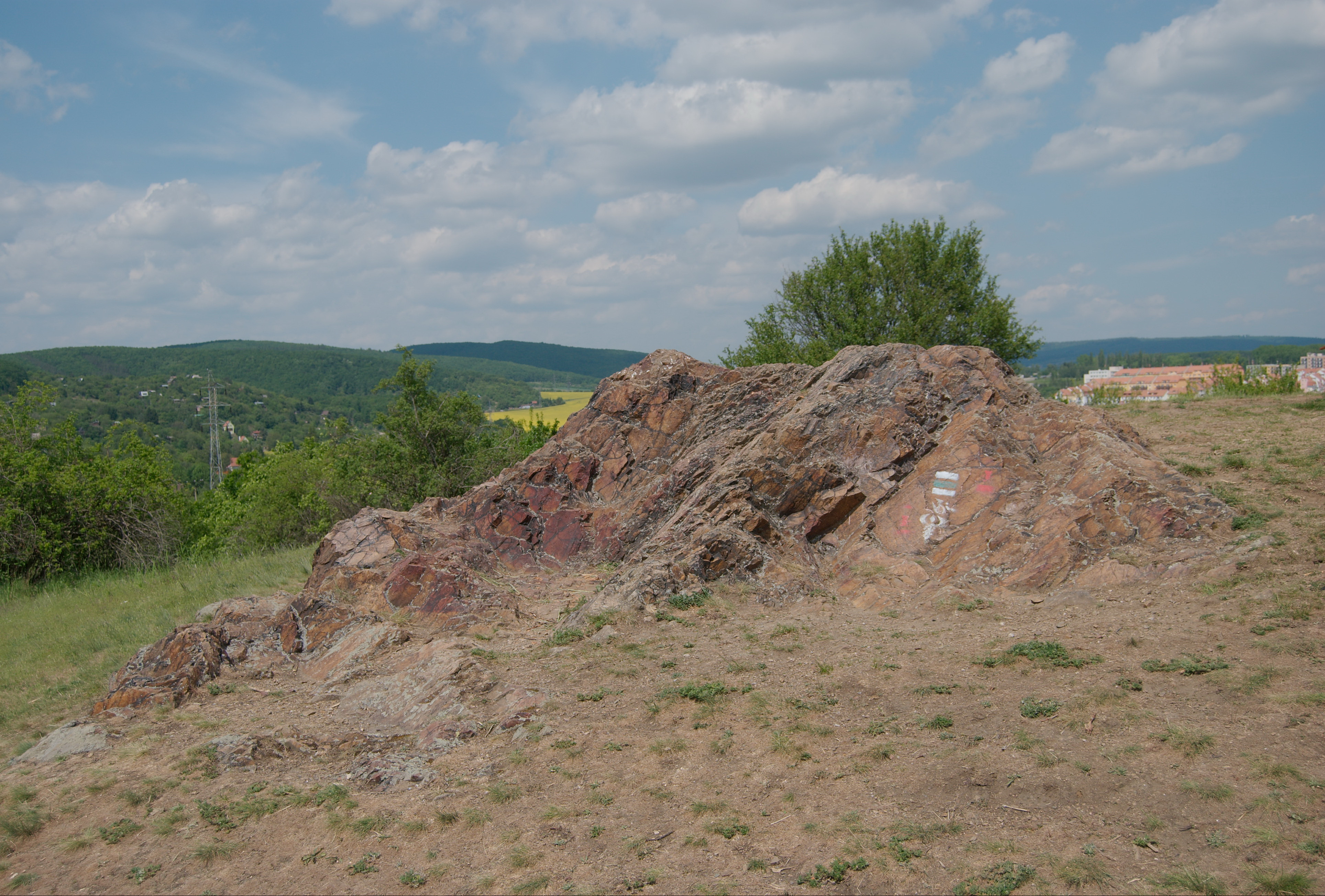 PP Medlánecké kopce - Kus skály na vrcholu Medláneckého kopce